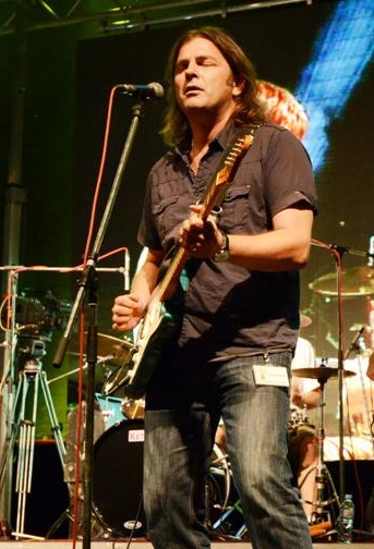 Nikola Čuturilo at Rockwood festival 2013, Devojački Bunar, Serbia